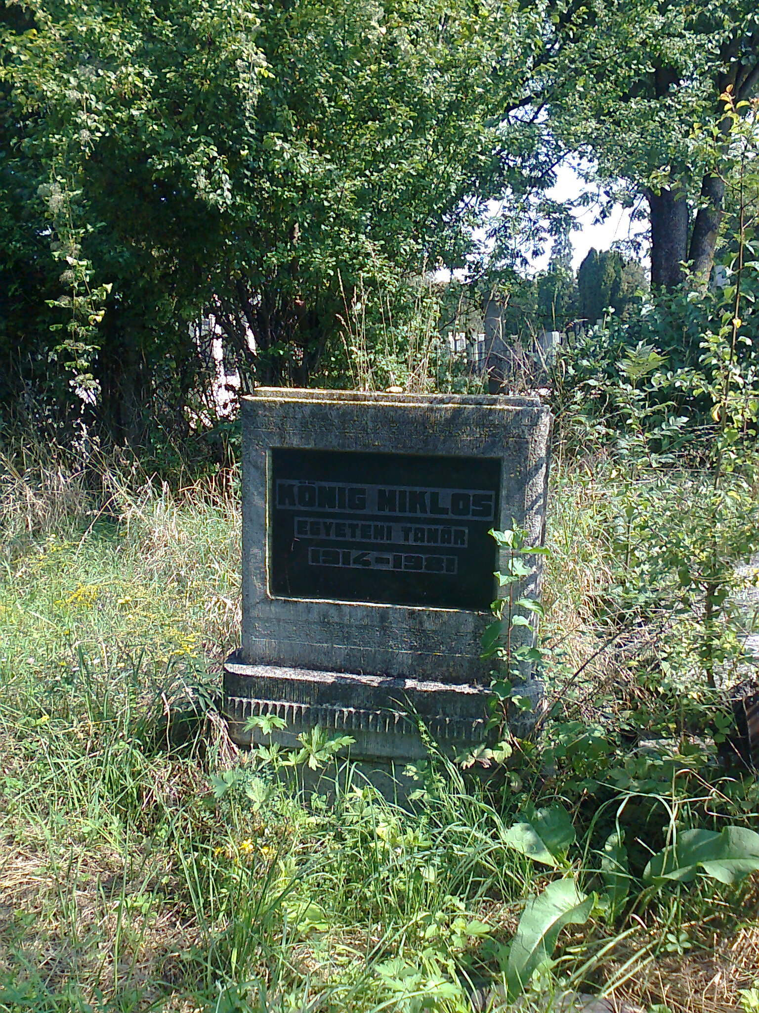 König Miklós (1914-1981) mezőgazdász sírja Kolozsváron a Sólyom utcai neológ zsidó temetőben